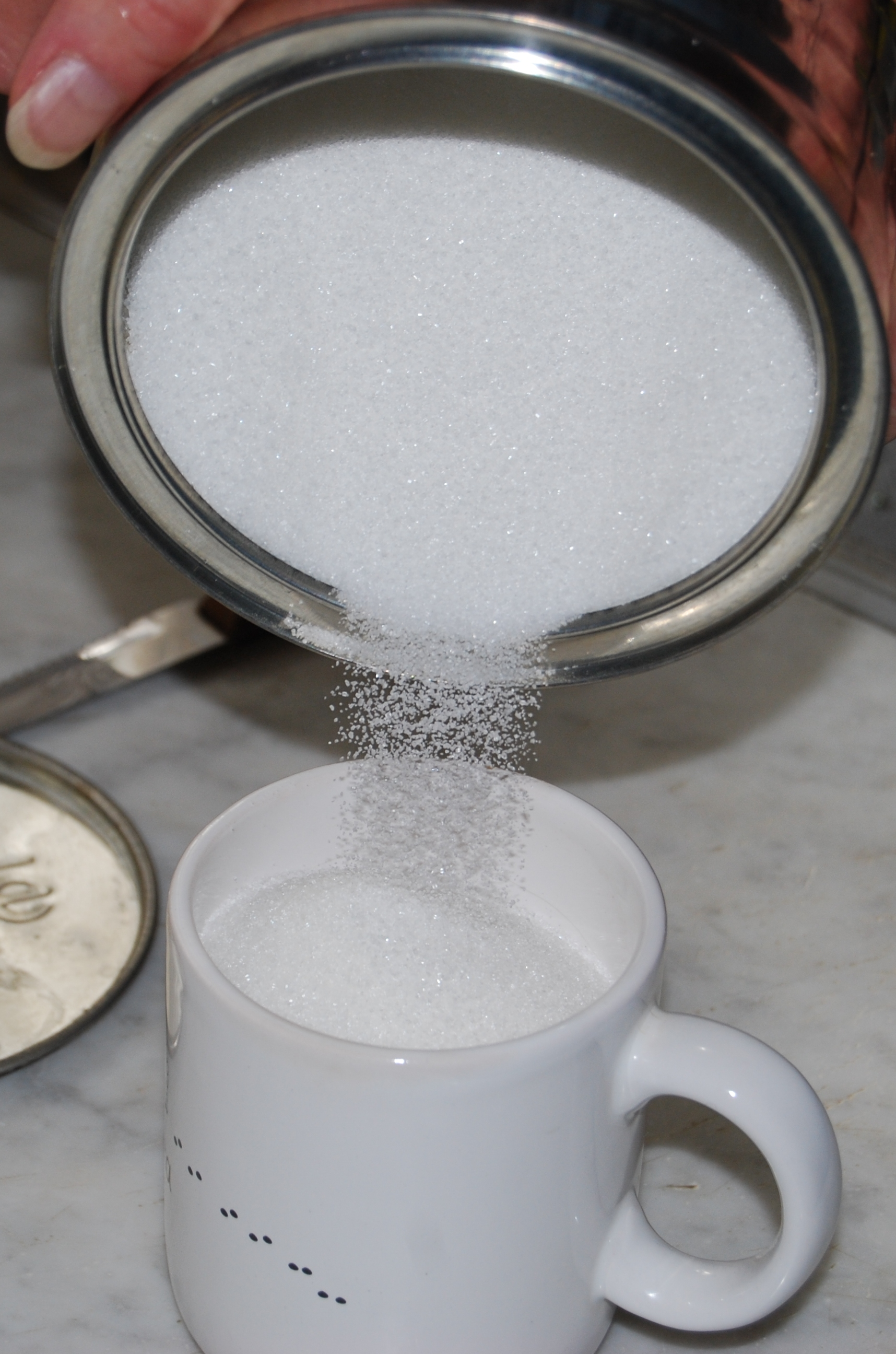 En la imagen se puede observar el trasvazamiento de Azúcar, desde un envase mayor a una tasa, como unidad de medida para cocinar.